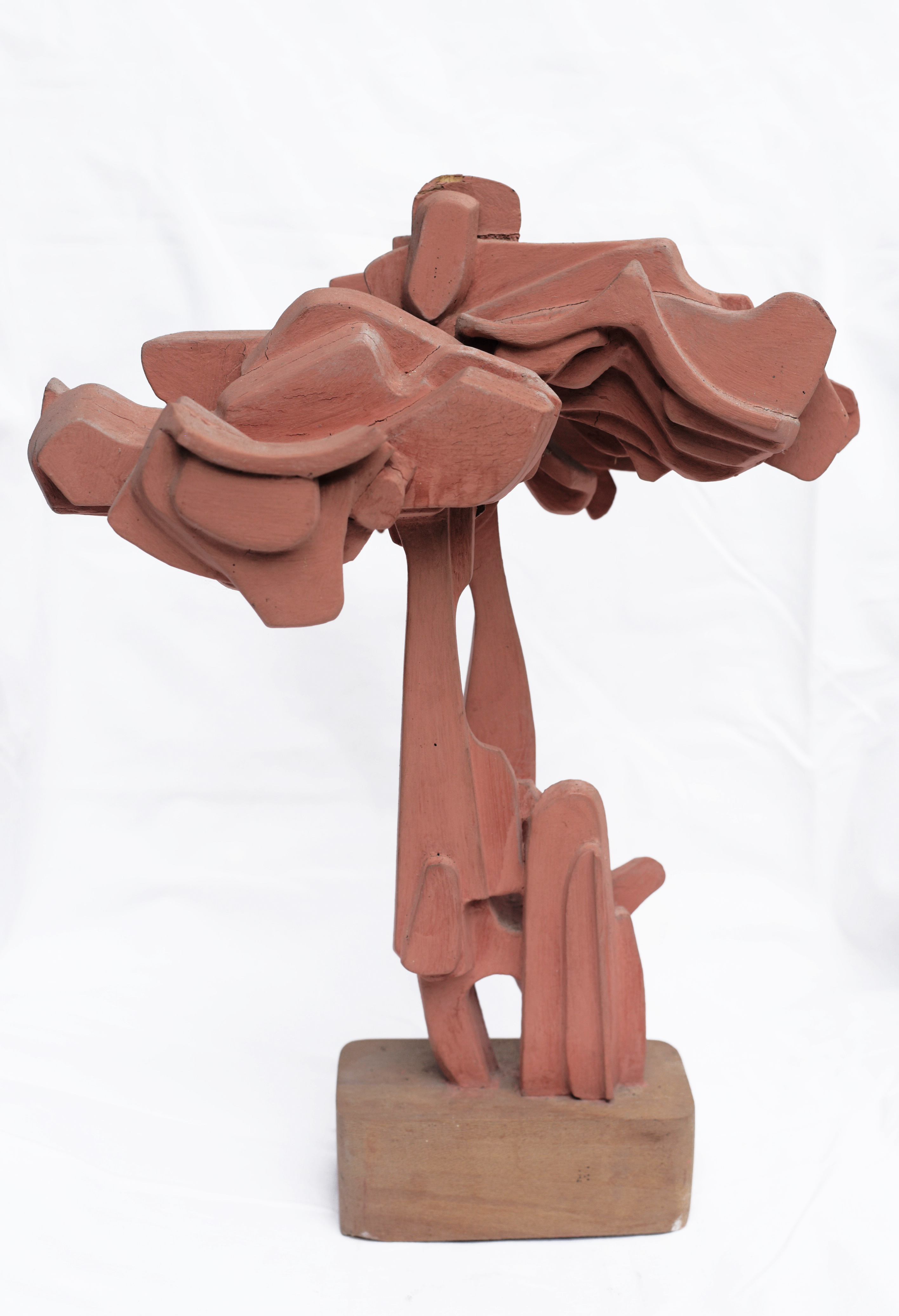 Alfredo Stanevičiaus skulptūra. Naudotos medžiagos: medis, degtas molis. XX a. II pusė Nuotrauka Bertos Tilmantaitės